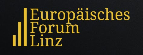 Logo des Europäischen Forum Linz